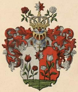 Dunteni suguvõsa aadlivapp